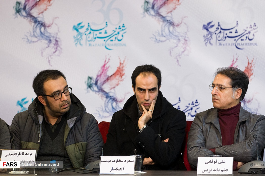 از راست: علی فوقانی، مسعود سخاوت دوست و فرید ناظر فصیحی در نشست خبری فیلم «مصادره» در سی و ششمین دوره جشنواره فیلم فجر